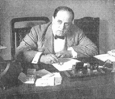 Fotografía del político español Juan Pich y Pon publicada en 1915 con motivo de haber recibido a los miembros de un congreso periodístico en calidad de alcalde accidental de Barcelona